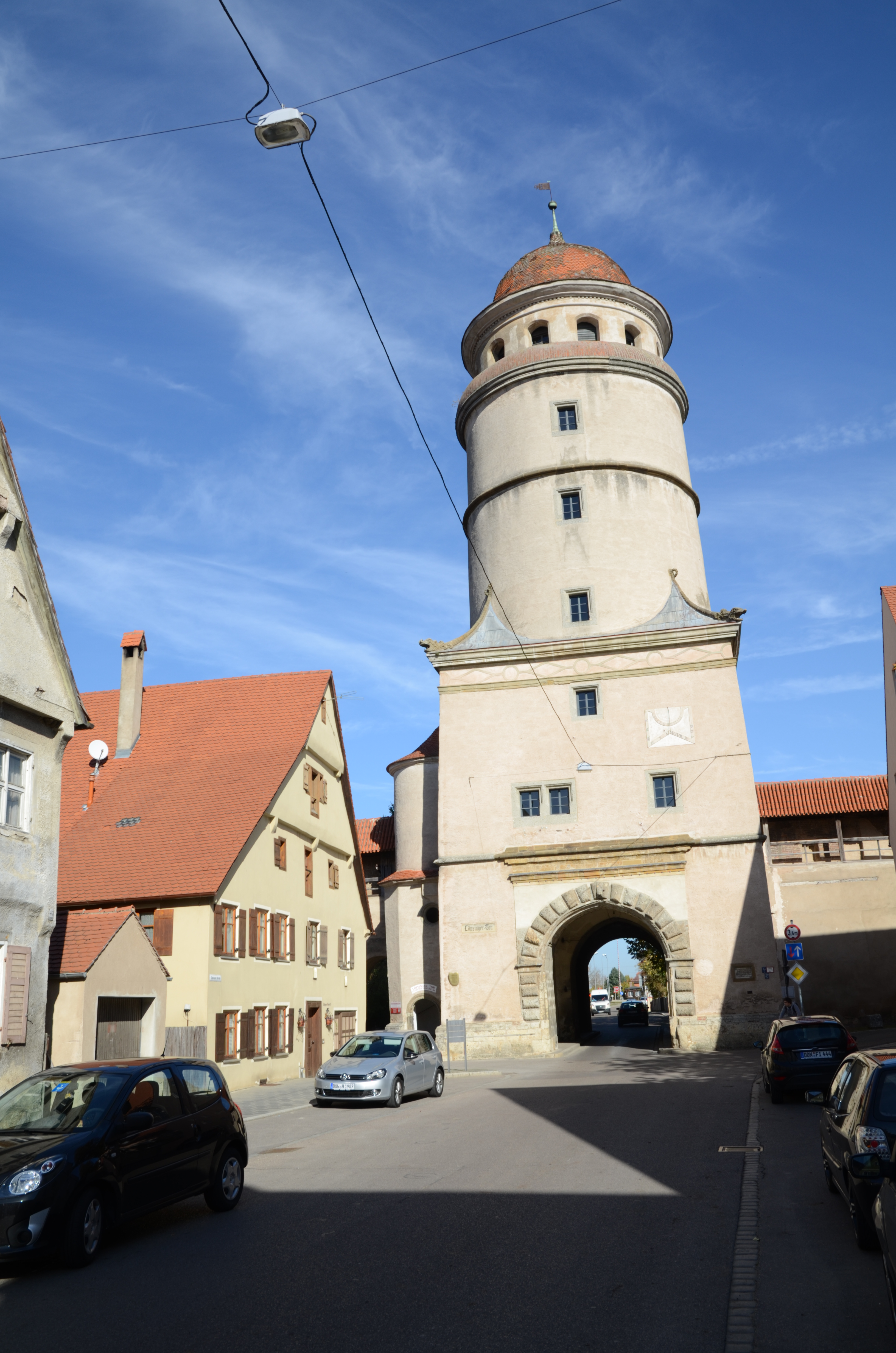 Nördlingen, An der Deininger Mauer 10